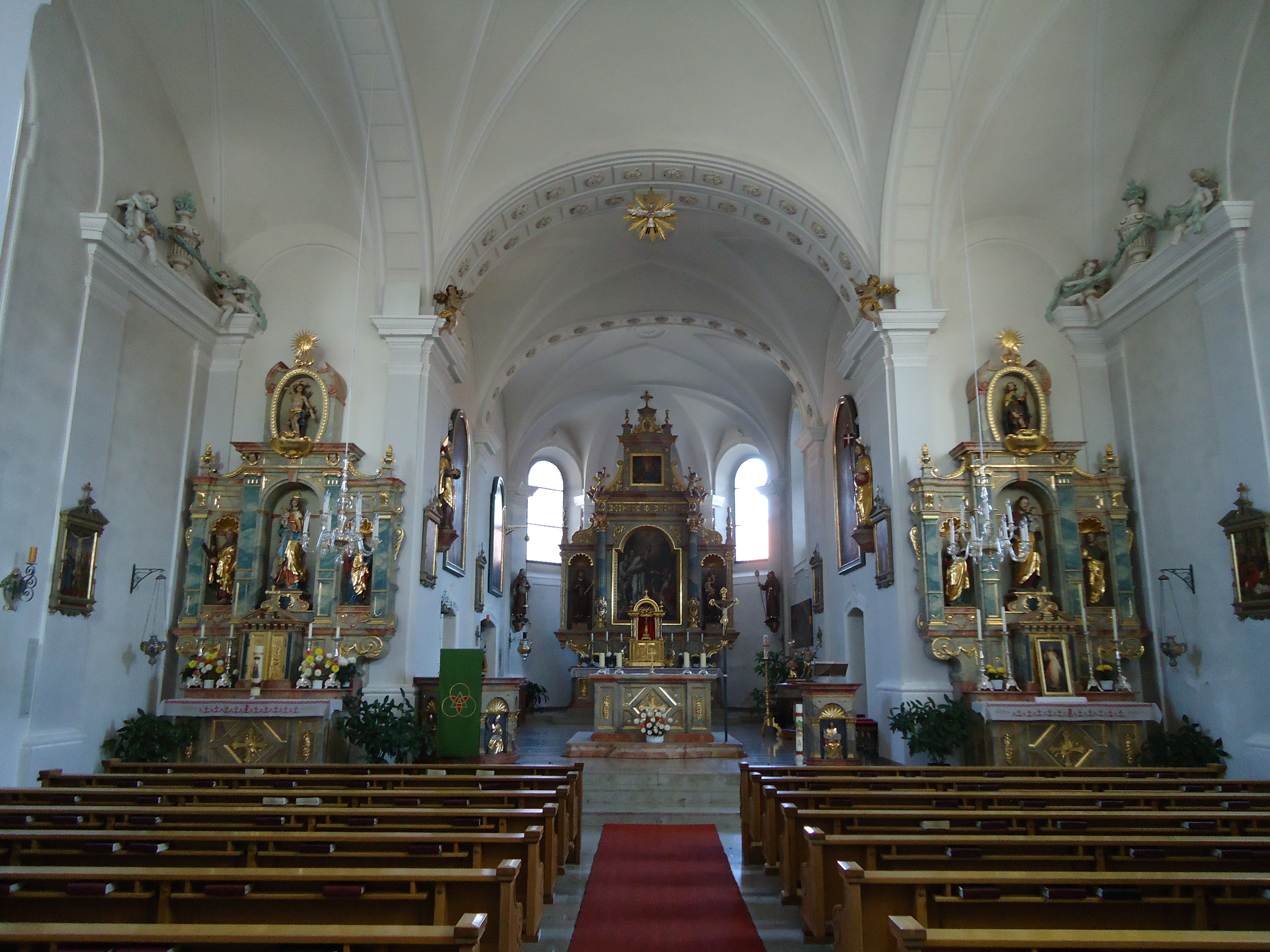 Stadtpfarrkirche St. Nikolaus in Bärnau - Innenraum